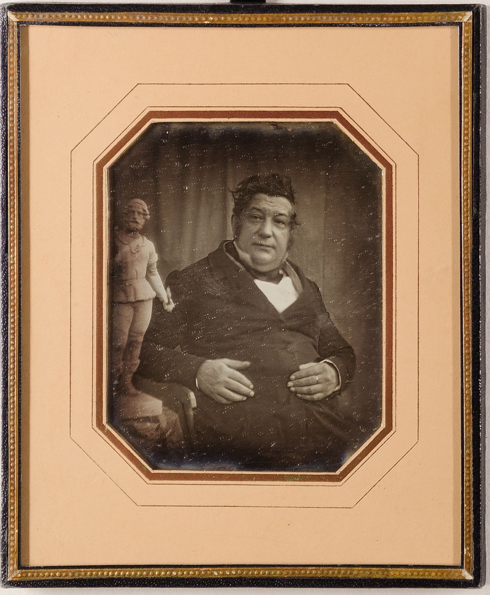 Der Dekorationsmaler und Lithograph Carl Heinrich Kitzerow (1799-1874), um 1860